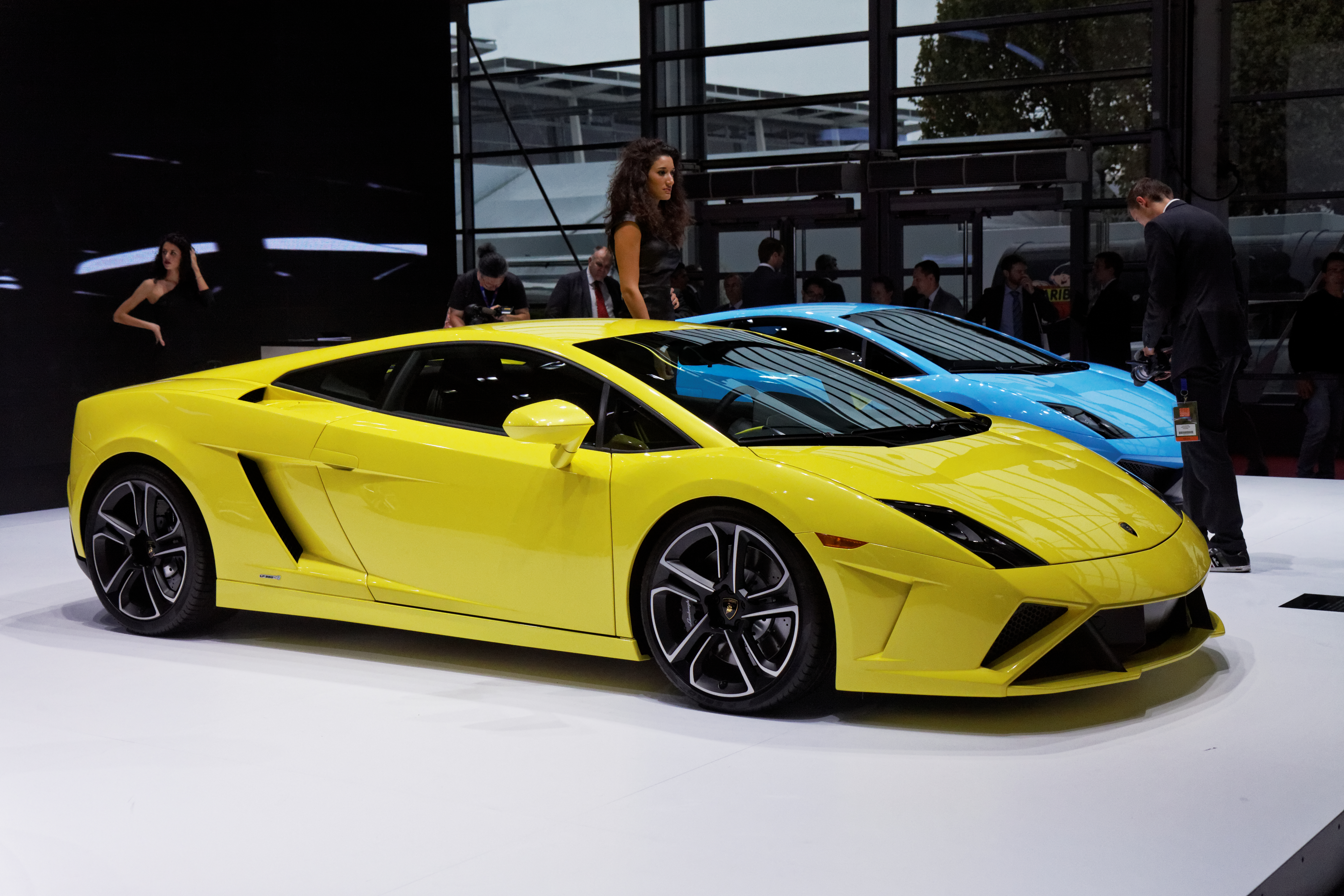 Une Lamborghini Gallardo LP 560-4 présentée lors du Mondial de l'Automobile de Paris 2012.